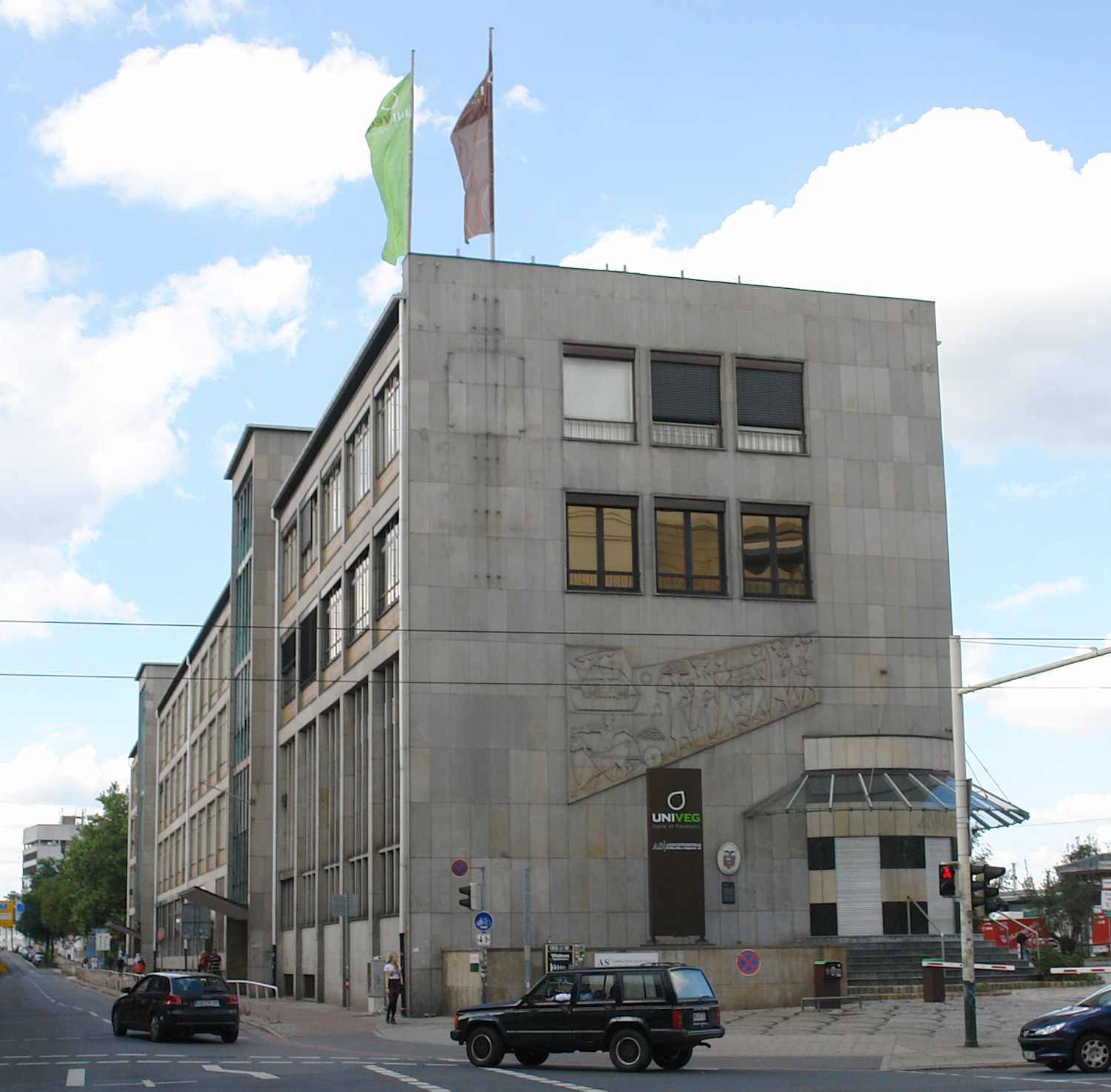 Haus Atlanta am Breitenweg 29-33, Sitz der Univeg Deutschland GmbH (ehemals Atlanta AG)